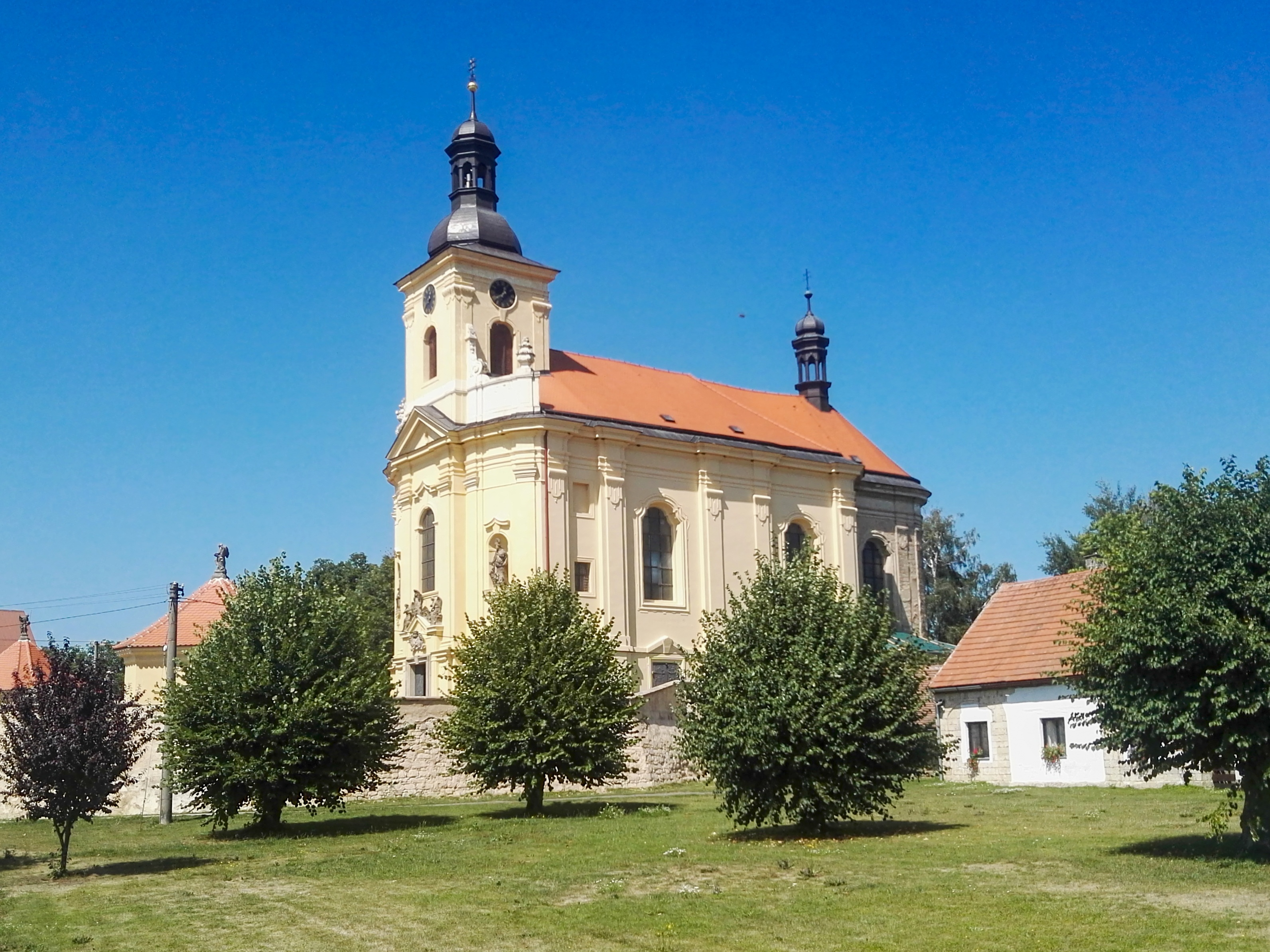 Kostel sv. Václava, Veliš, od jihovýchodu